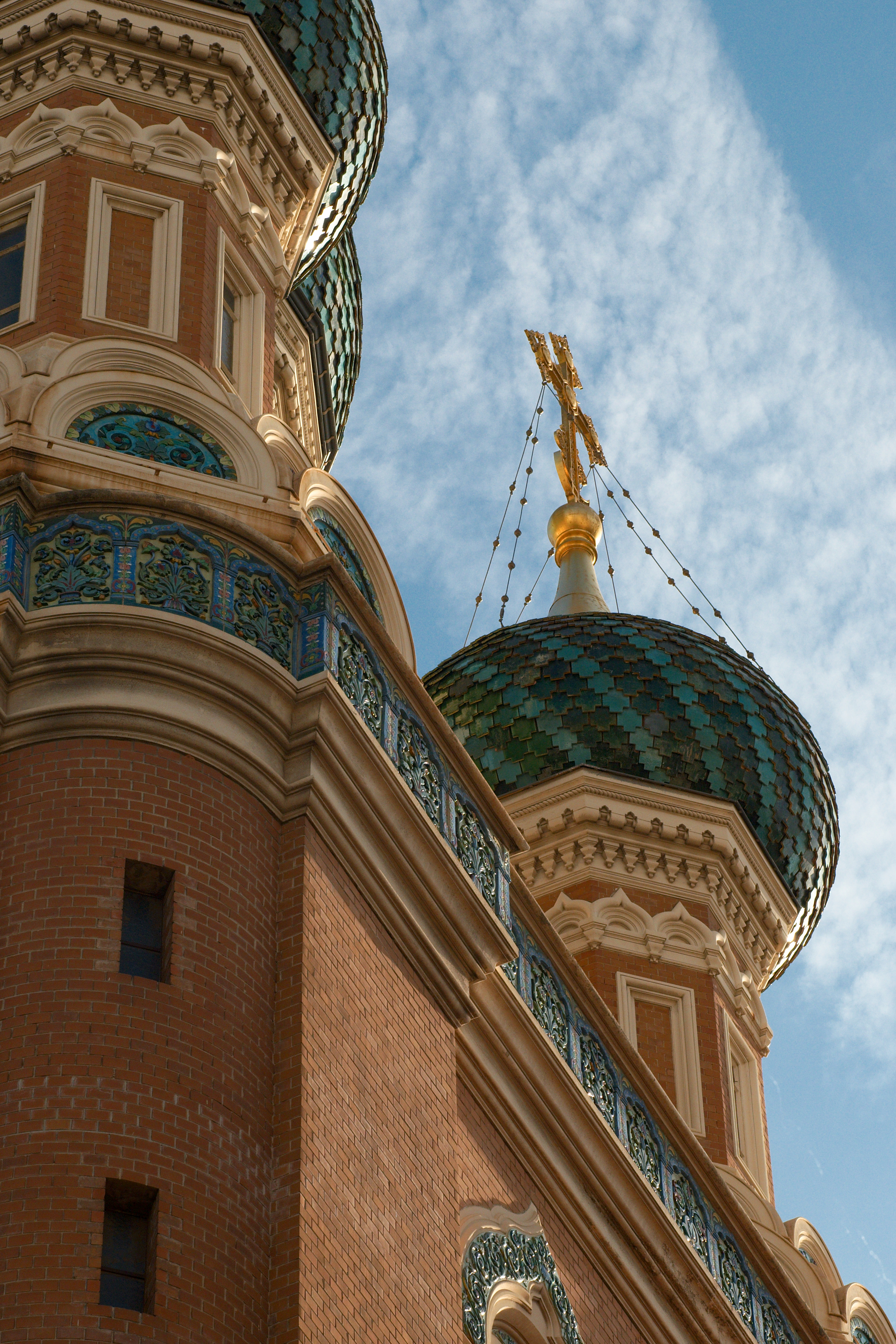 Cathédrale Saint-Nicolas de Nice